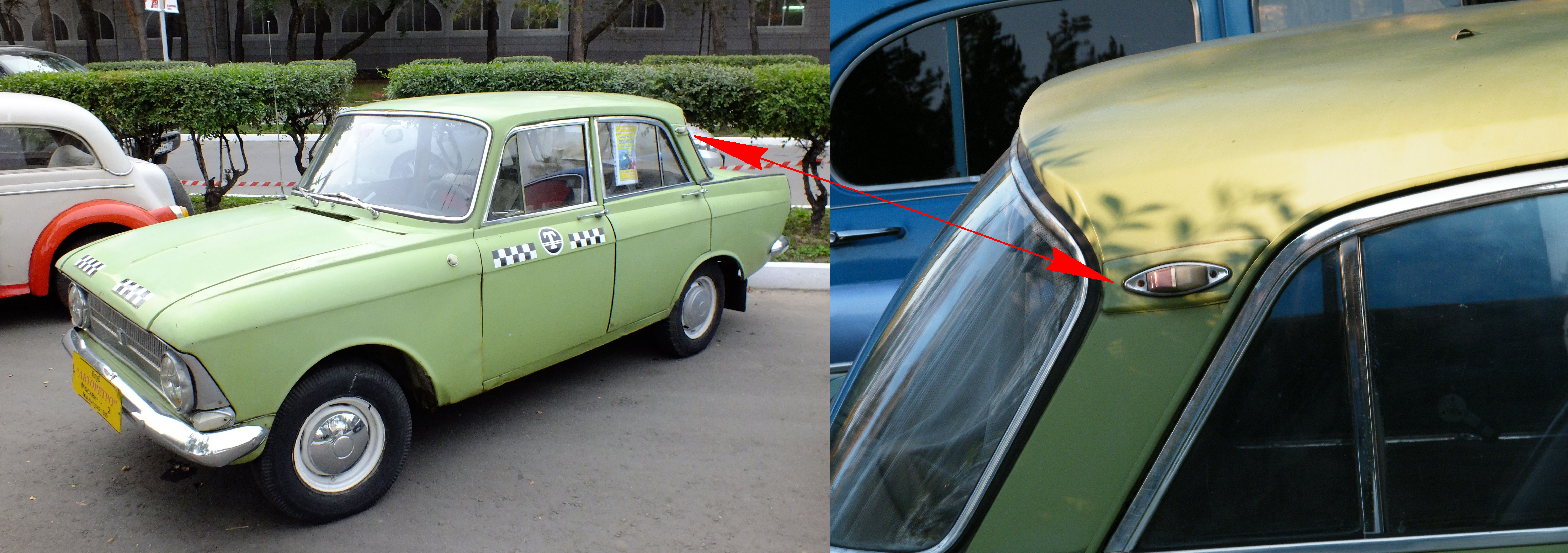 Москвич-412 1985 года выпуска